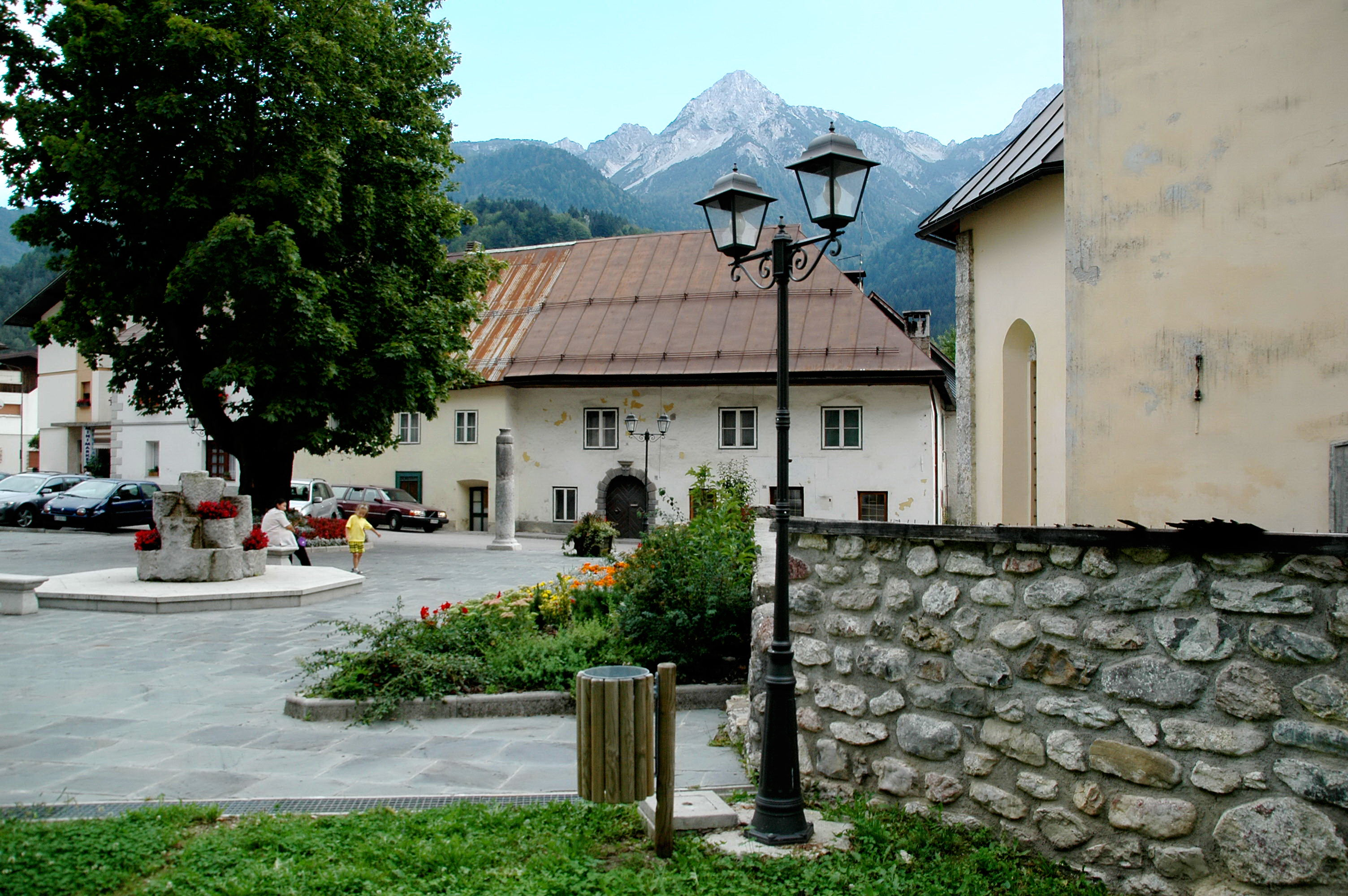 Main square at Malborghetto in Val Canale, Friuli, Italy